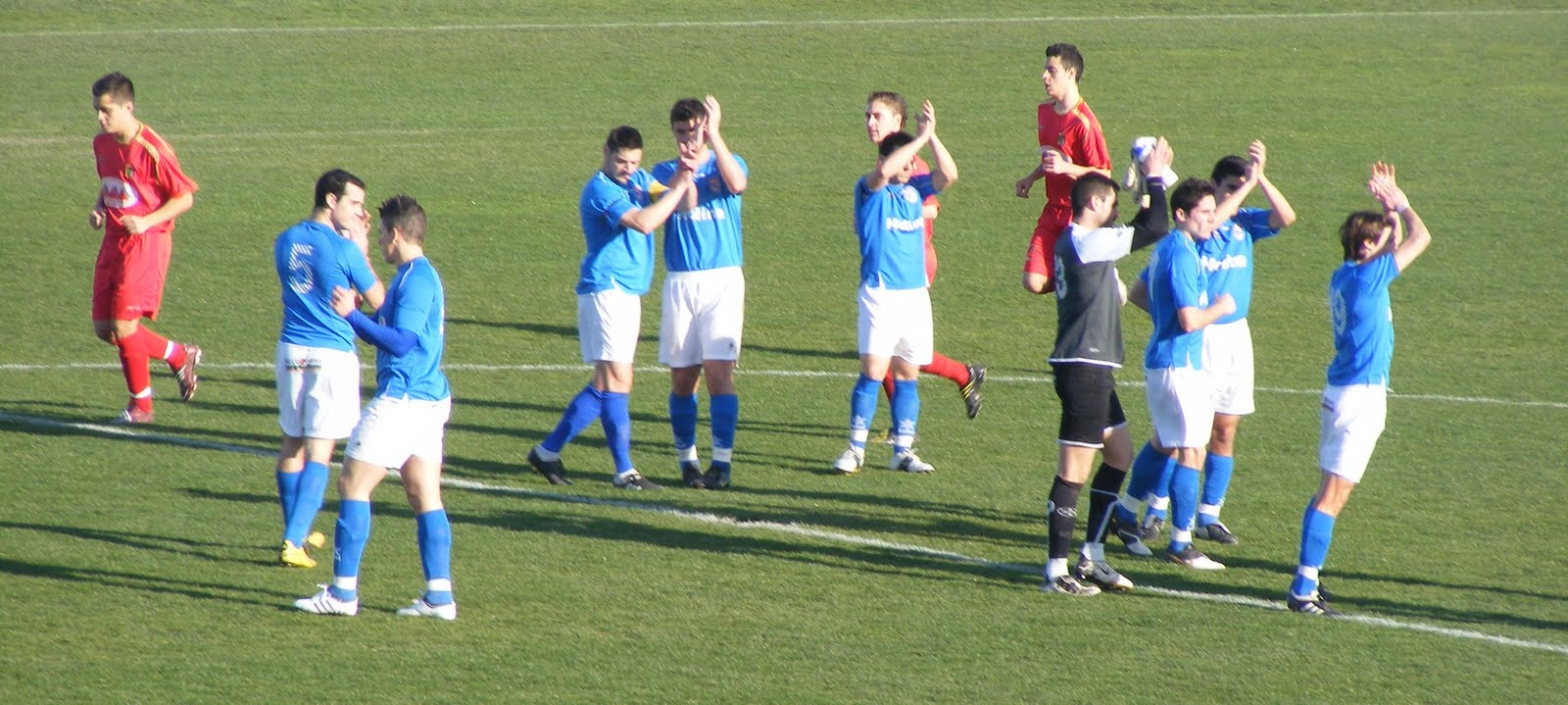 El CF Molina salta al campo antes de un partido en casa contra el Guadalupe.